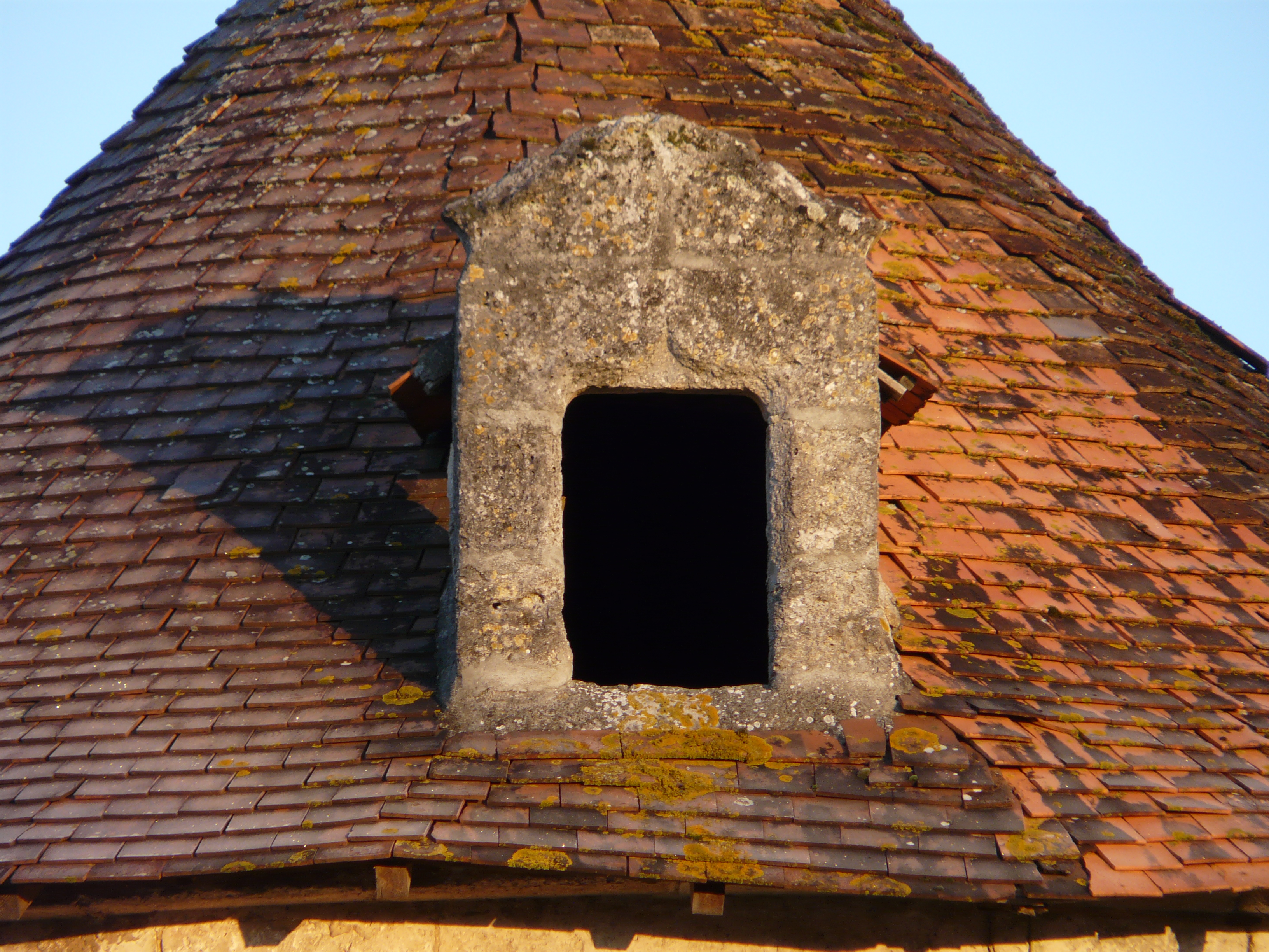 Lucarne du colombier du bourg, La Tour-Blanche, Dordogne, France.